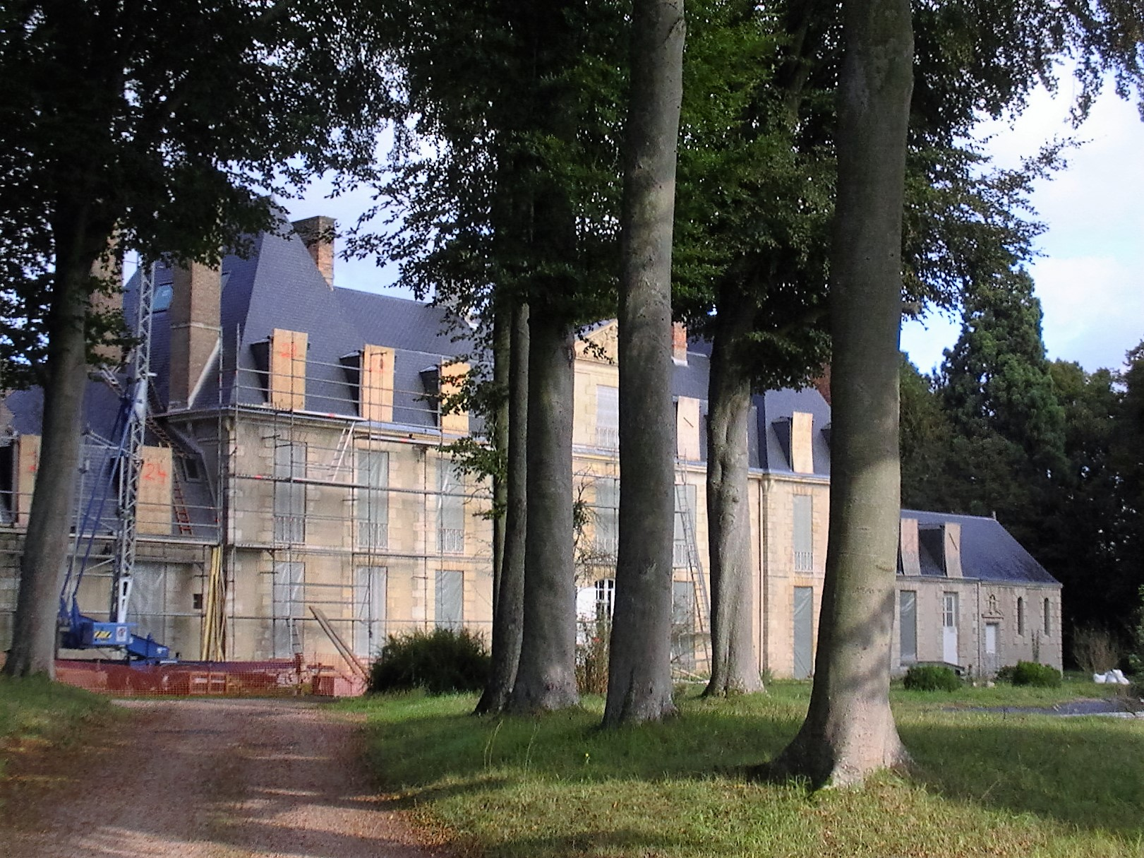 Tosny (Eure) - Le château en façade, rue Saint-Sulpice.